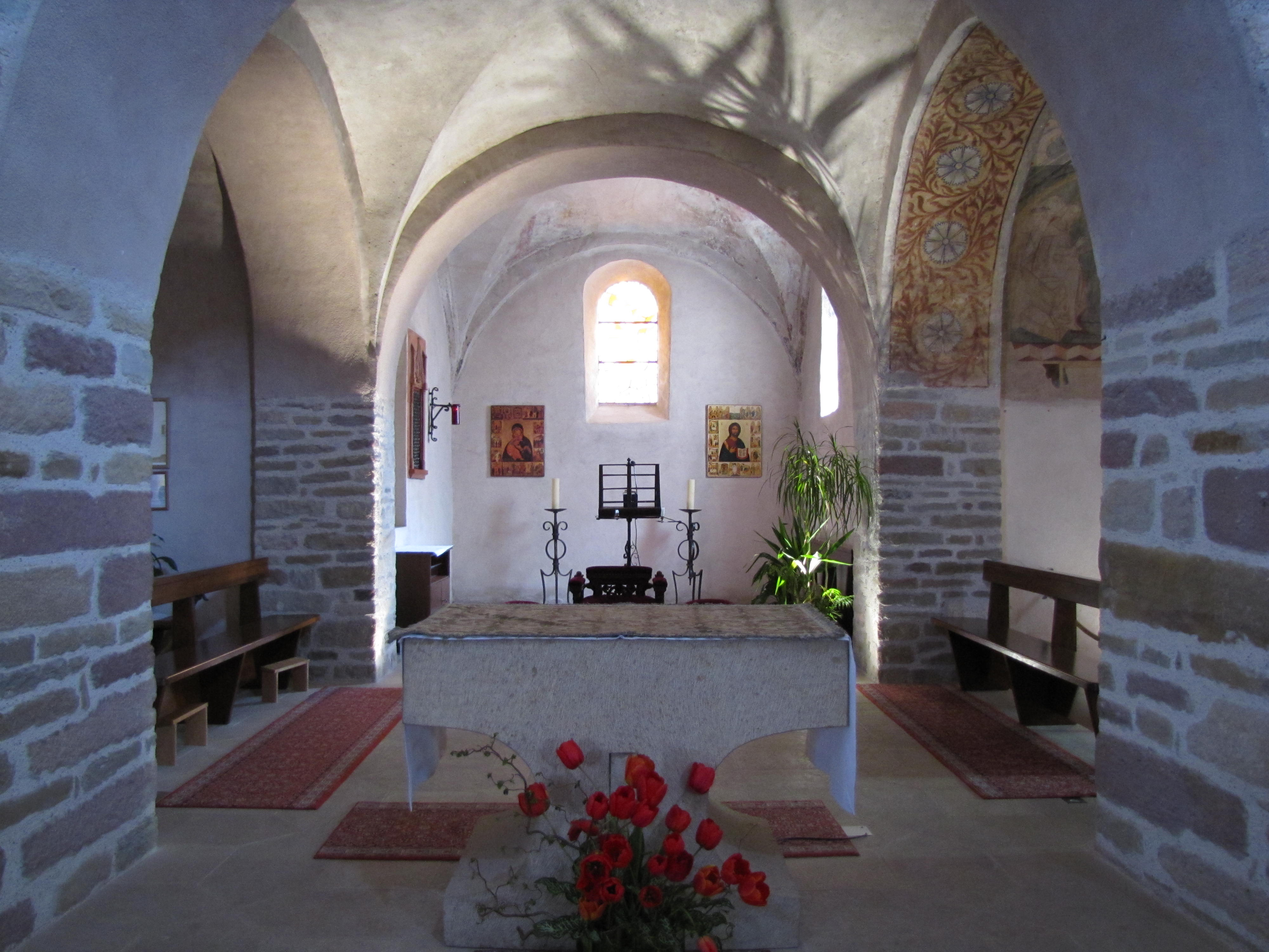 Alsace, Haut-Rhin, Ottmarsheim, Église abbatiale d'Ottmarsheim (PA00085580, IA00096033).